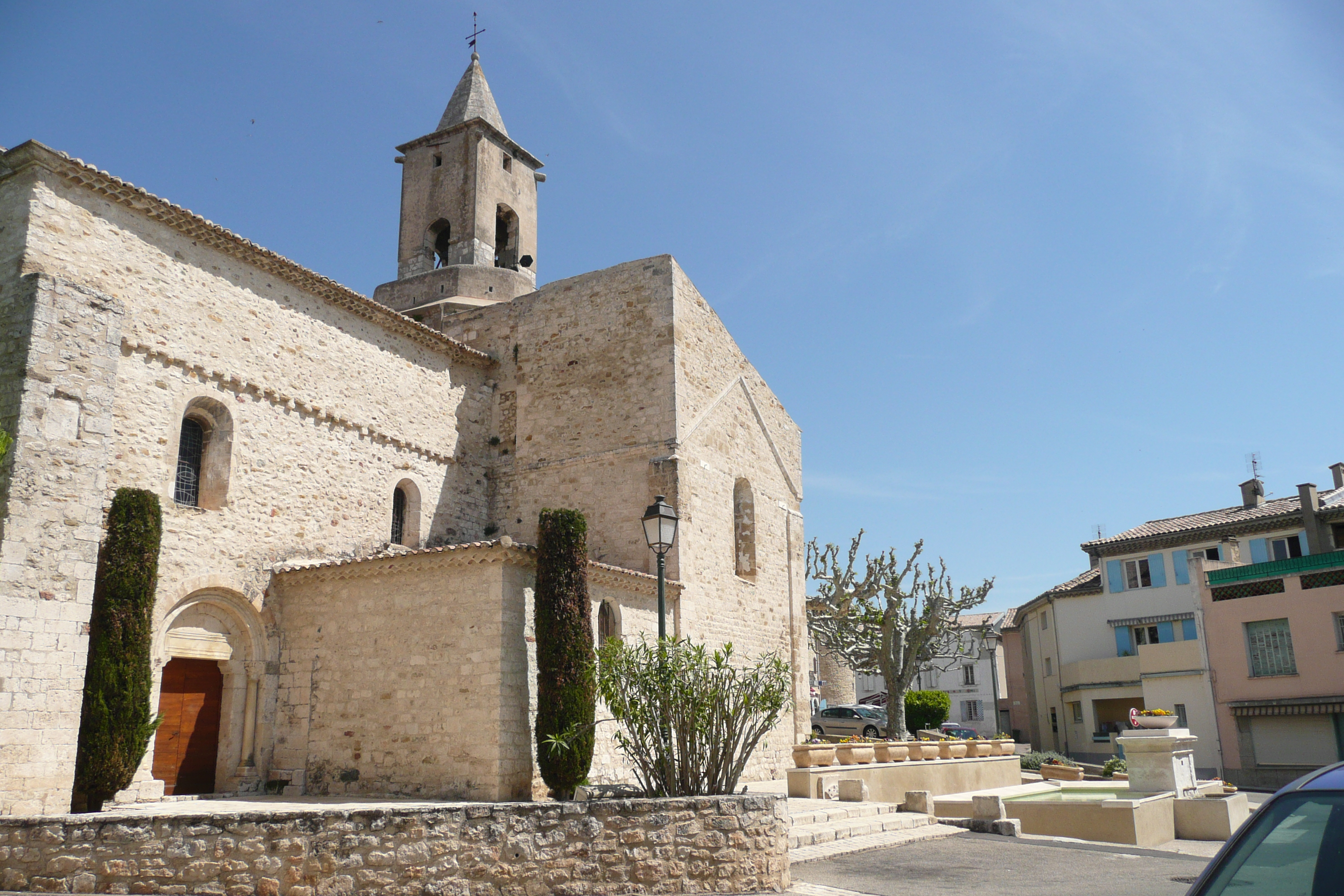 Eglise à Saint-Just (Ardèche).